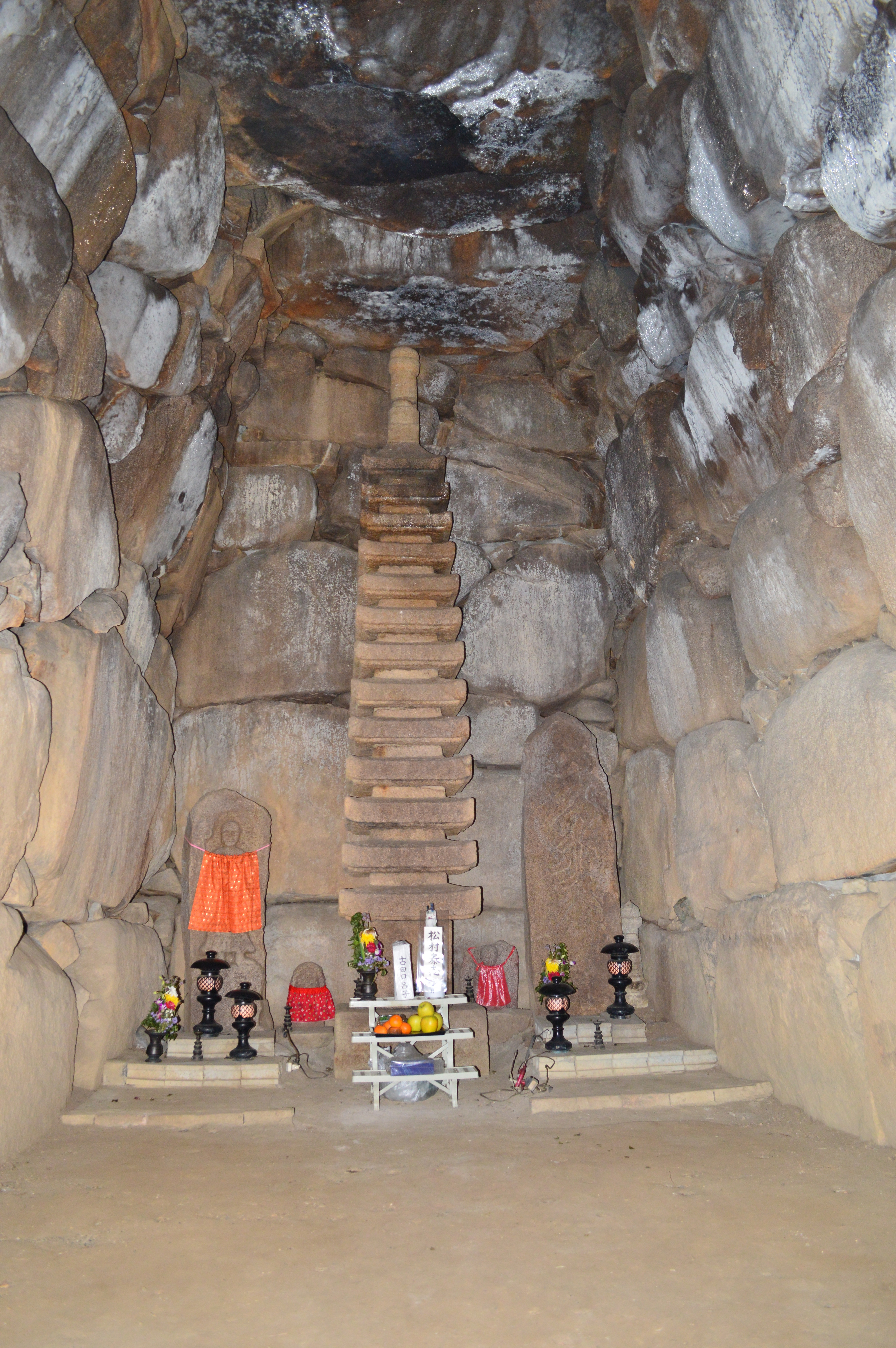 鉢塚古墳 (池田市) 石室玄室